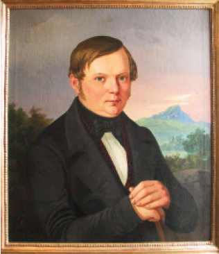 Rusolf Friedrich Schüle I. (1808 - 1886)